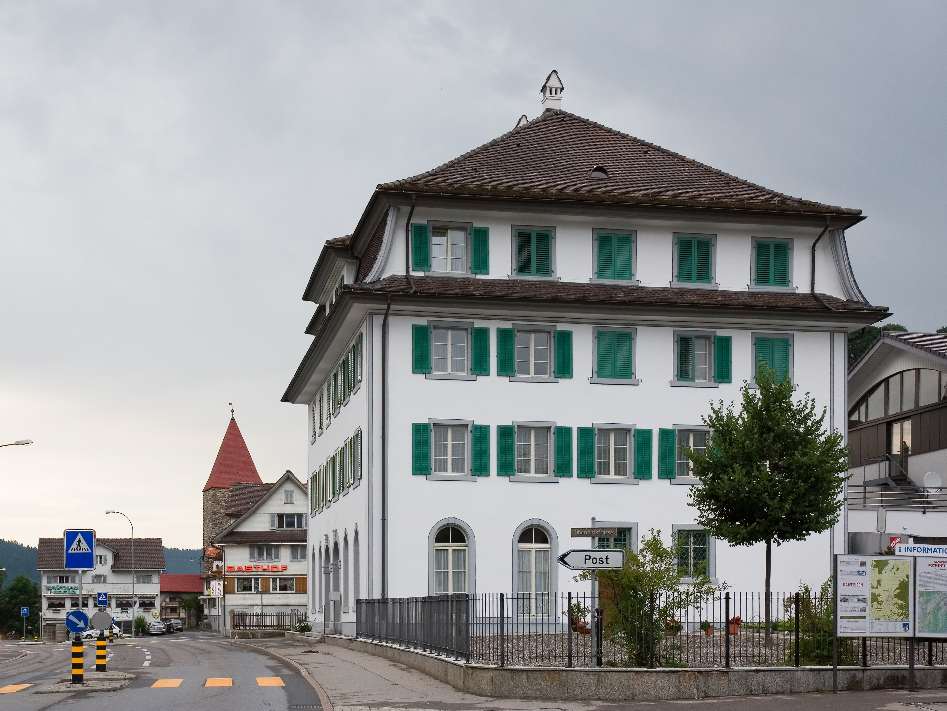 Der Pfarrhof von Rothenthurm, Schweiz